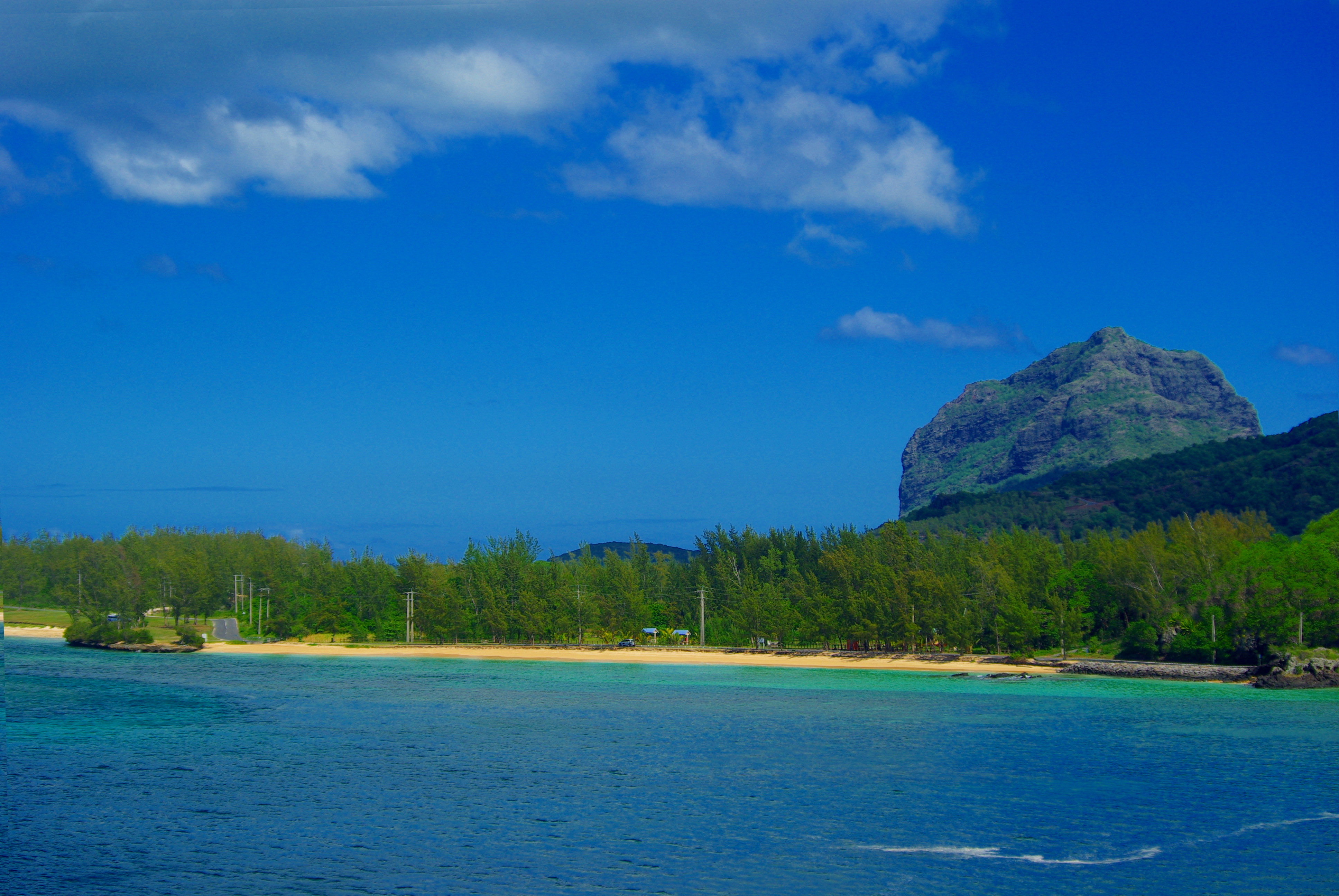 Der Le Morne Brabant im Südwesten von Mauritius